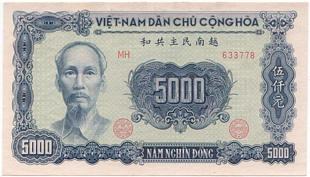 Vietnam Dongs.